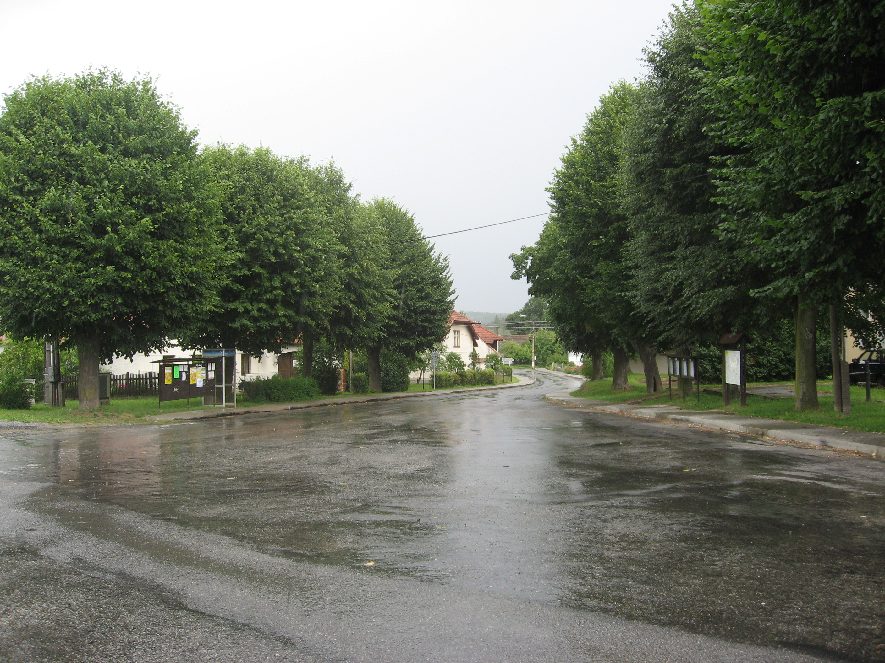 Sedlice